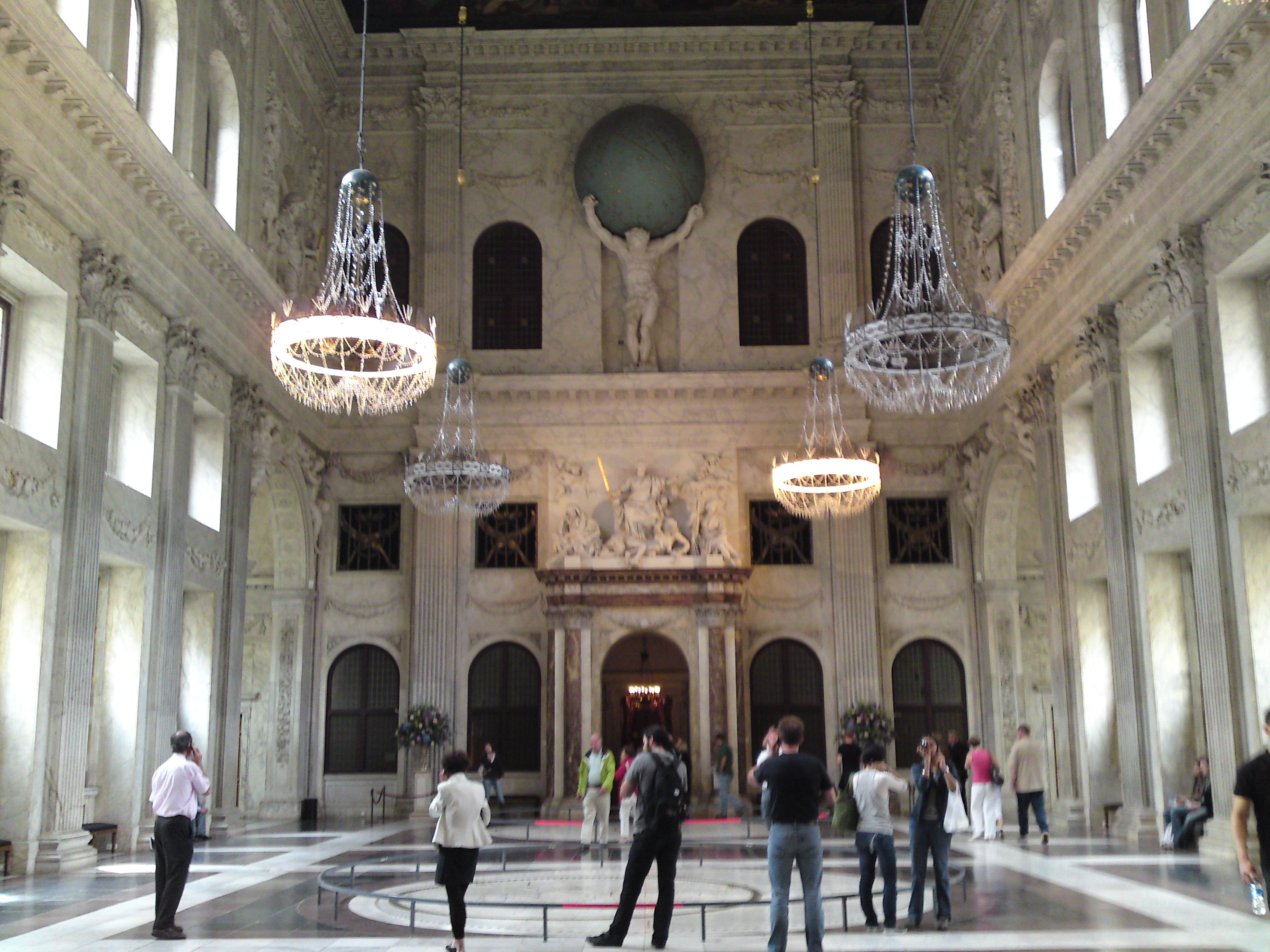 Overzicht van de Burgerzaal richting het beeld van Atlas in het Paleis op de Dam.